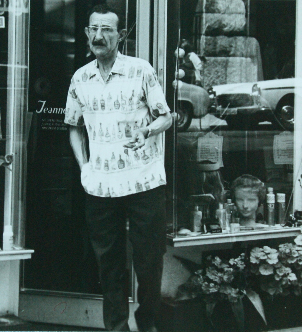 Georges Spiro vor Jeanne Fiolics Laden in Nizza